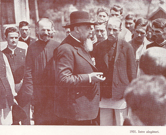 Nicolae Iorga intre alegatori - 1931